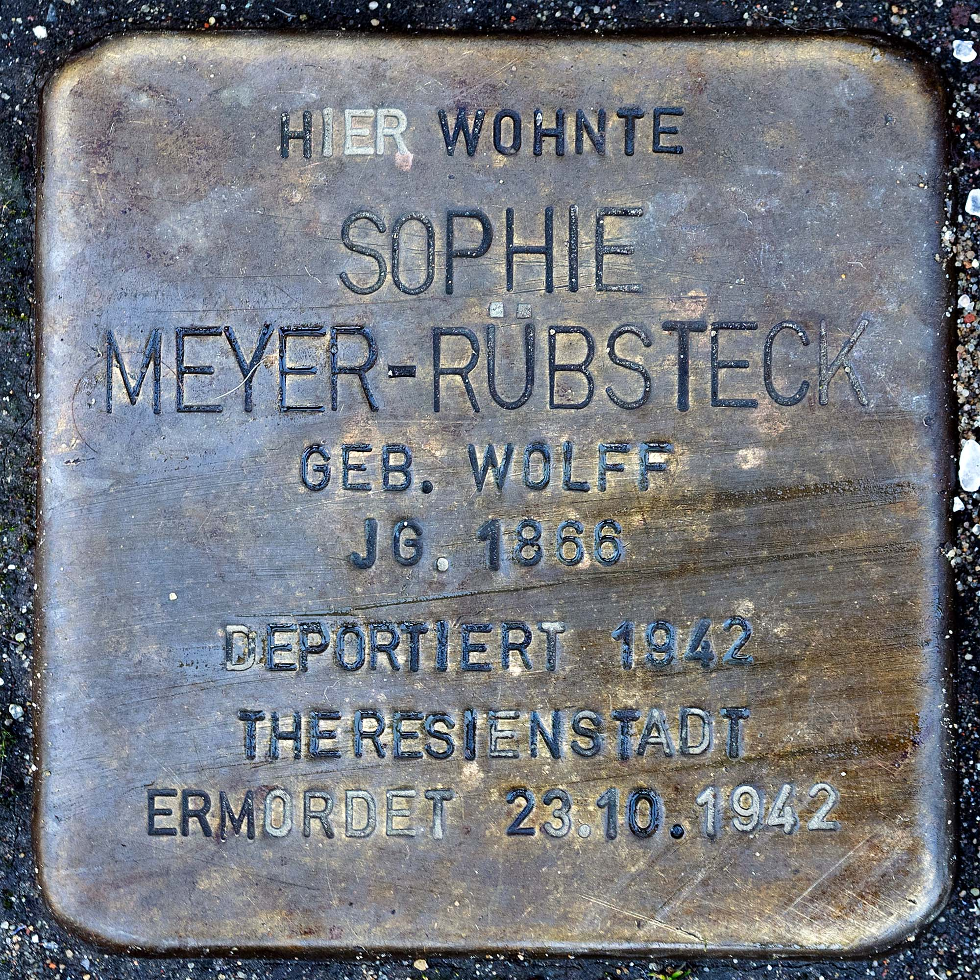 Stolperstein für Meyer-Ruebsteck Sophie